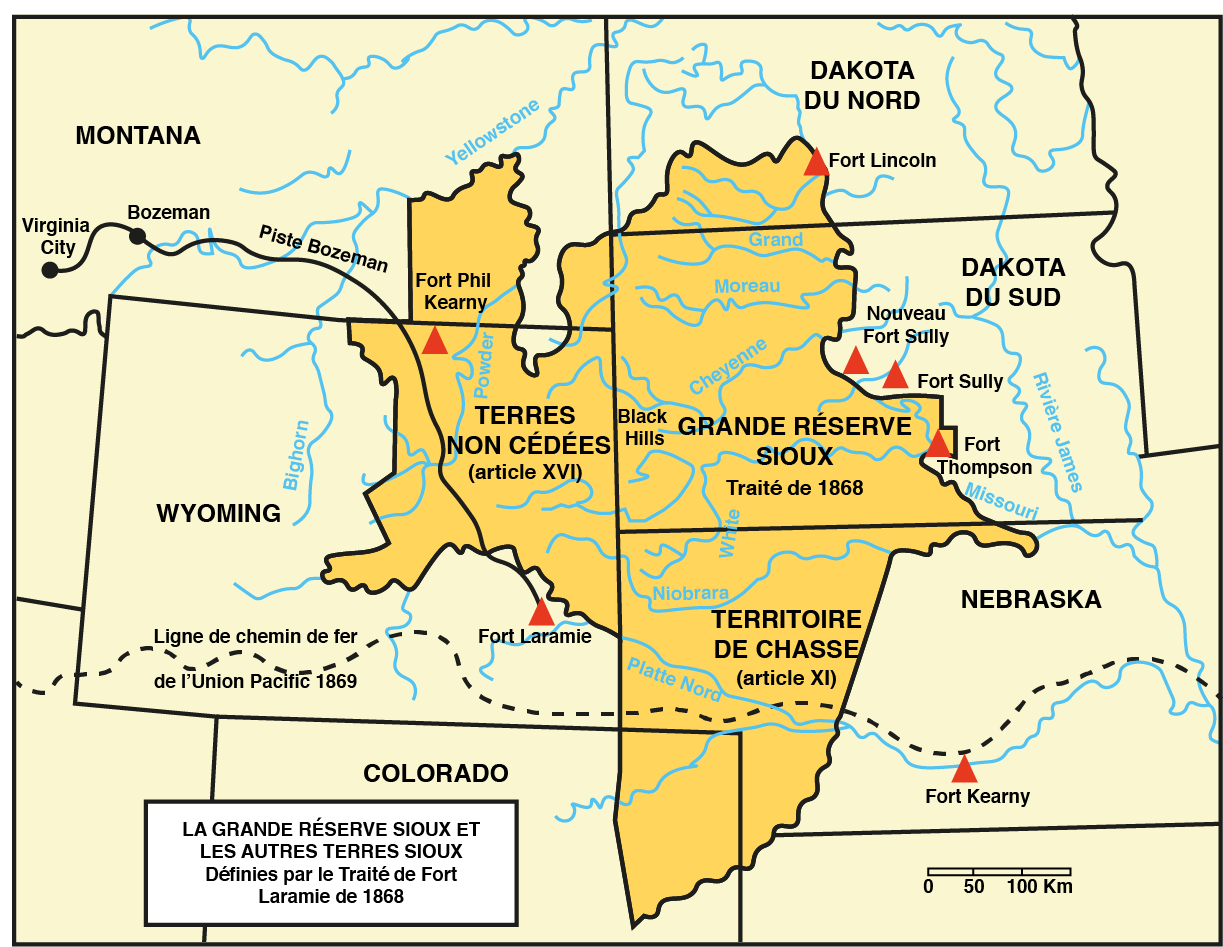 Grande réserve sioux et autres territoires sioux définis par le traité de fort laramie en 1868 (rivière powder modifiée)